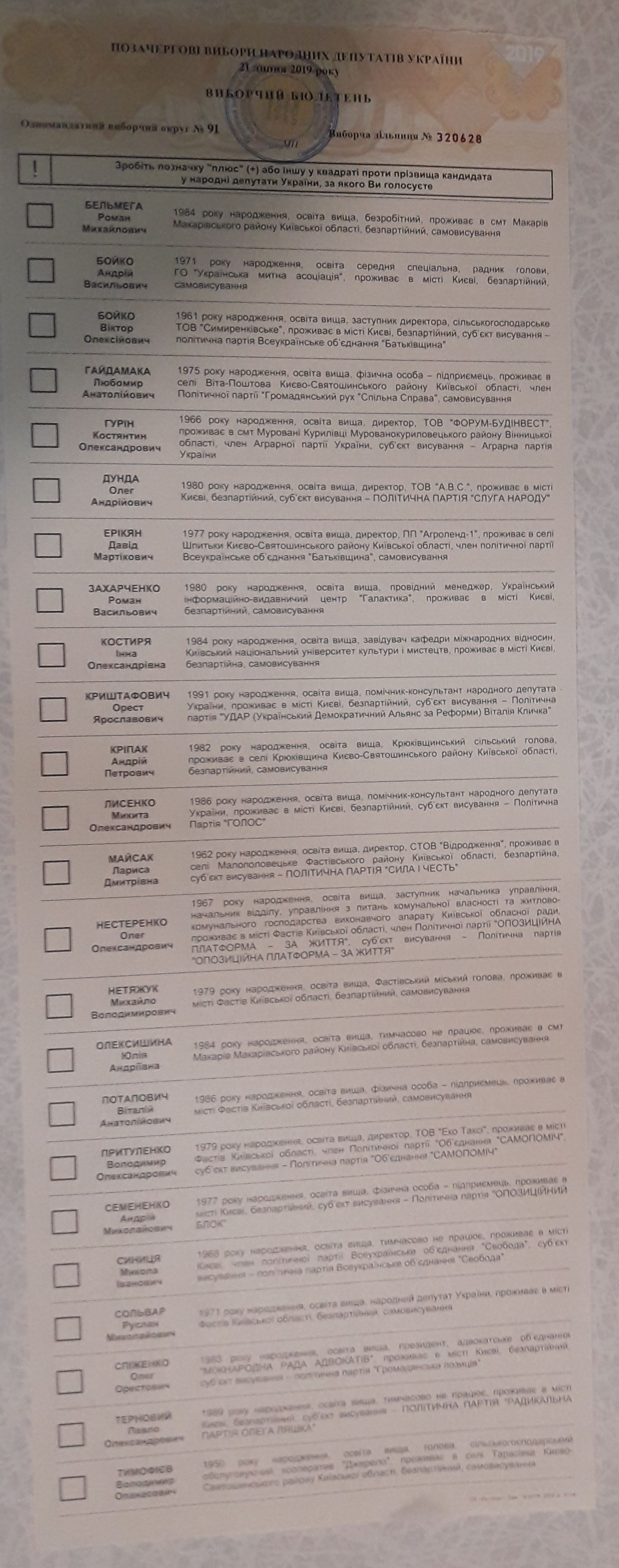 Бюлетень на парламентських виборах (ОВО № 91)